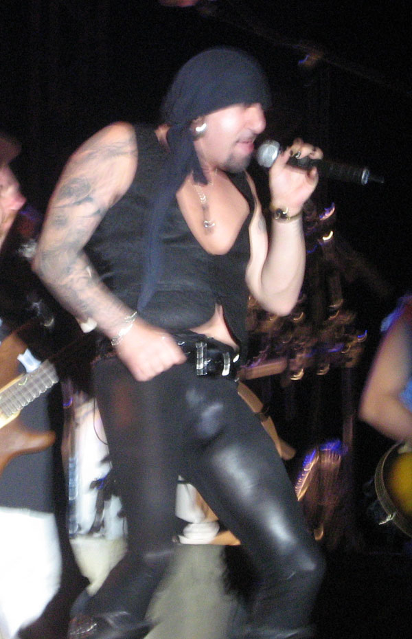 Txus, miembro del grupo Mägo de Oz, actuando el 12 de agosto de 2008 en la semana grande de Donosti.